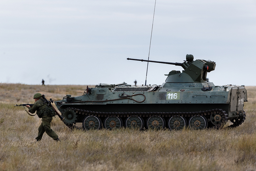 Подготовка расчетов ОТРК «Искандер» к применению в рамках СКШУ «Центр-2015».